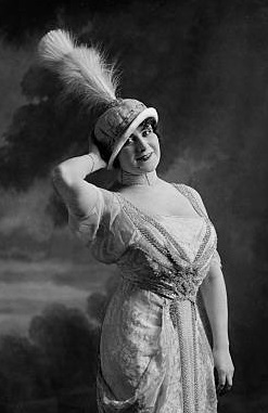 Ida Russka